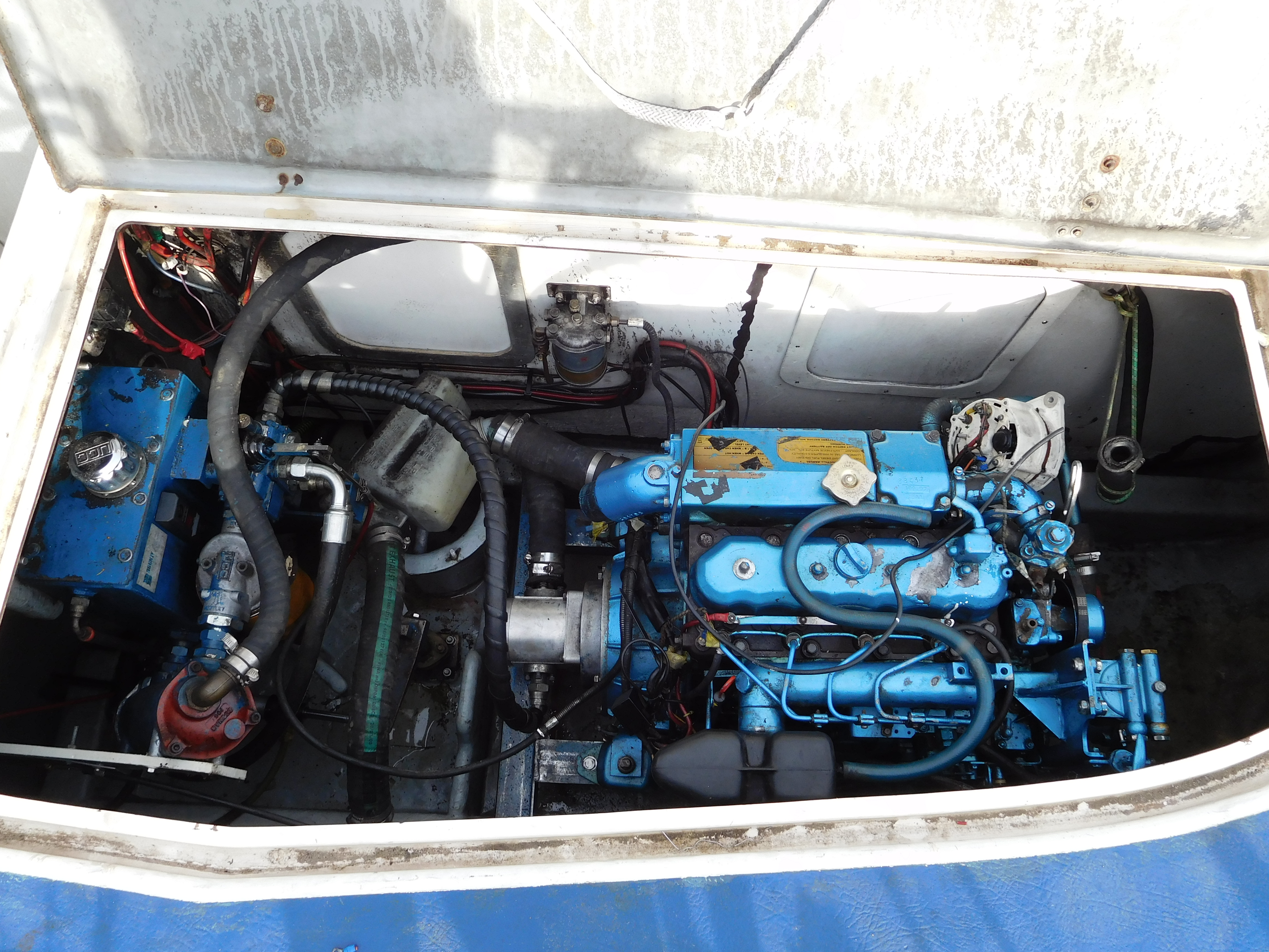 Moteur Diesel 4-cylindres marin japonais (Kubota ?), avec une transmission hydrostatique, d'un bateau de location ; port de Briare, Loiret, France.